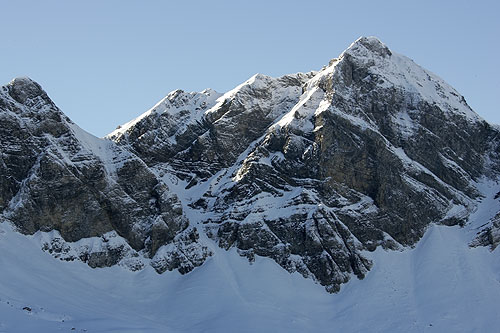 Melchsee-Frutt: Berge im Mittagslicht